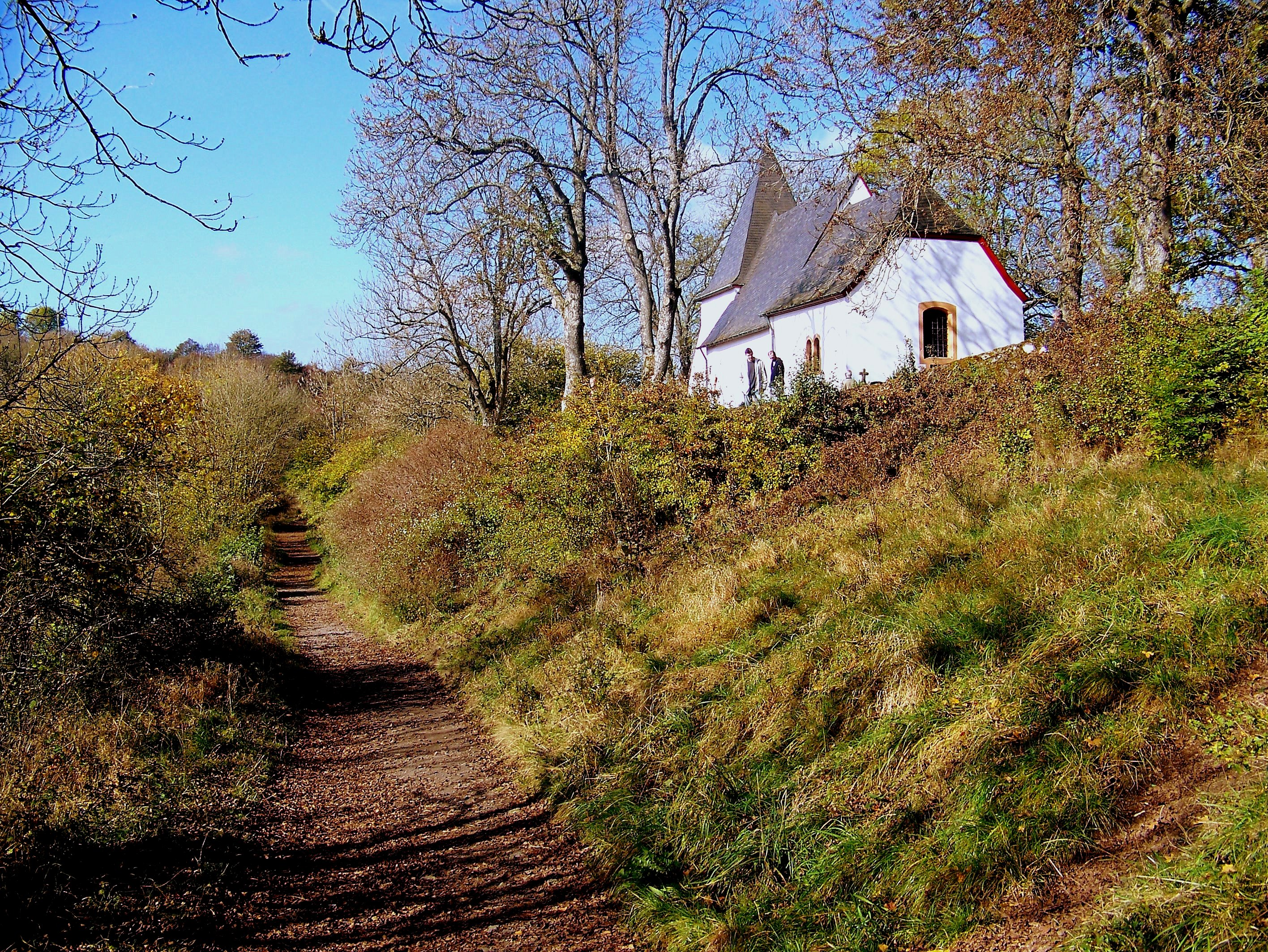 Weinfeld St Martin